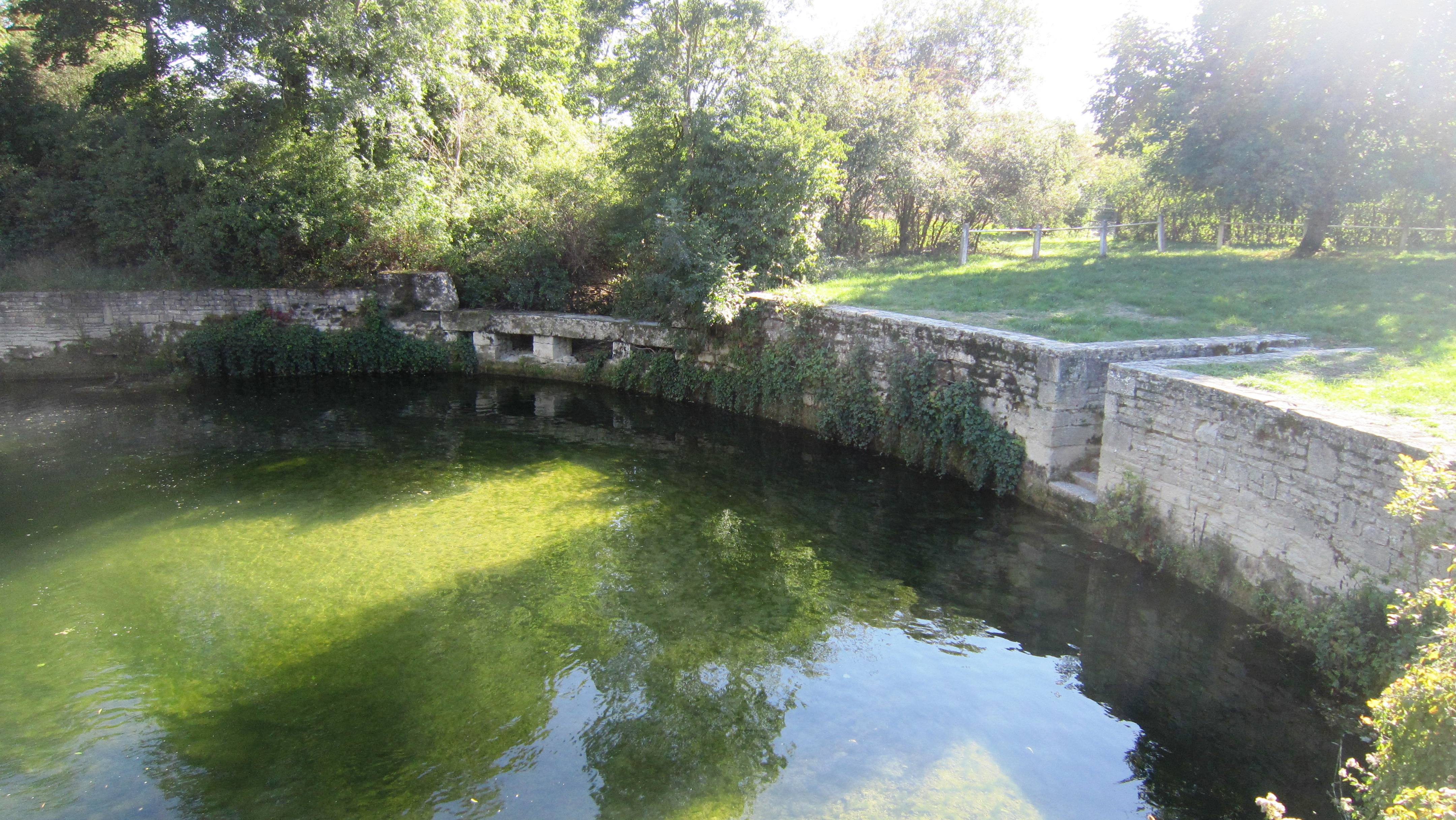 Installation sur la Seine du bassin de l'ancienne forge d'Ampilly-le-Sec (Côte-d'Or)